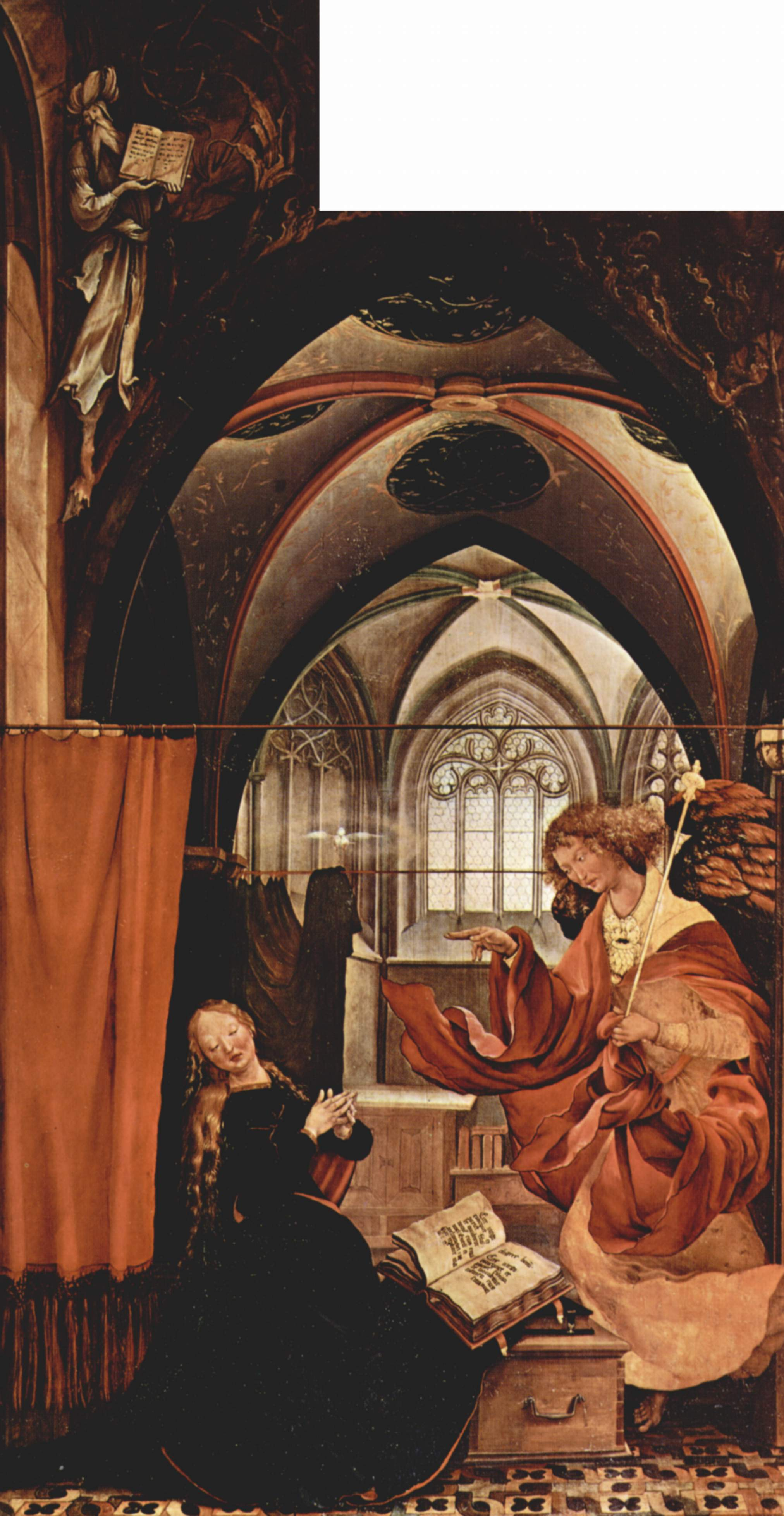 Wandelaltar, bestehend aus zehn Öltafeln und einem geschnitzten Schrein